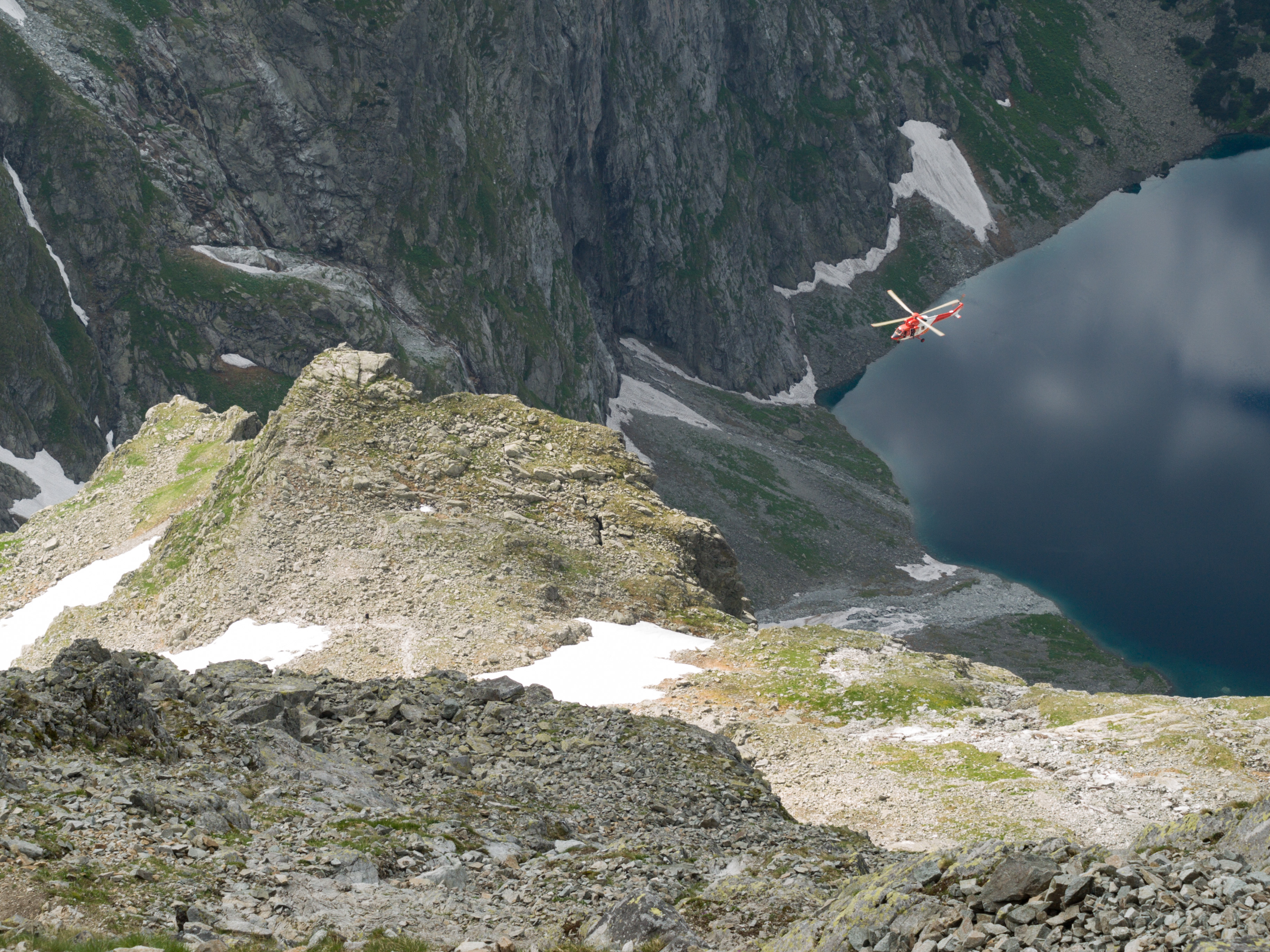 Widok na Bulę pod Rysami i lądujący na niej śmigłowiec TOPR ze szlaku prowadzącego Grzędą Rysów. Po prawej stronie niemal poziomego tarasu Buli pod Rysami widoczne jest pęknięcie – Szpara pod Rysami. W dole Czarny Staw pod Rysami.